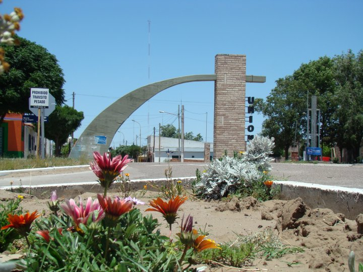 Arco de entrada al pueblo de Union